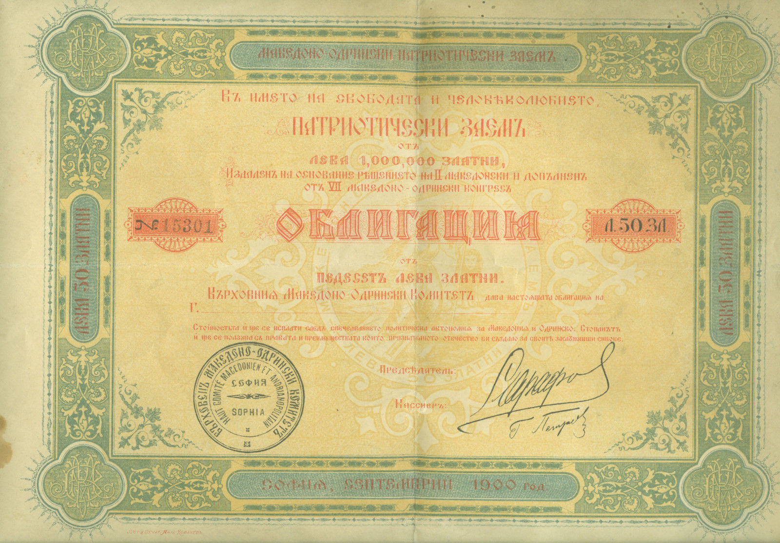 Облигация на ВМОК с подписа на Борис Сарафов.